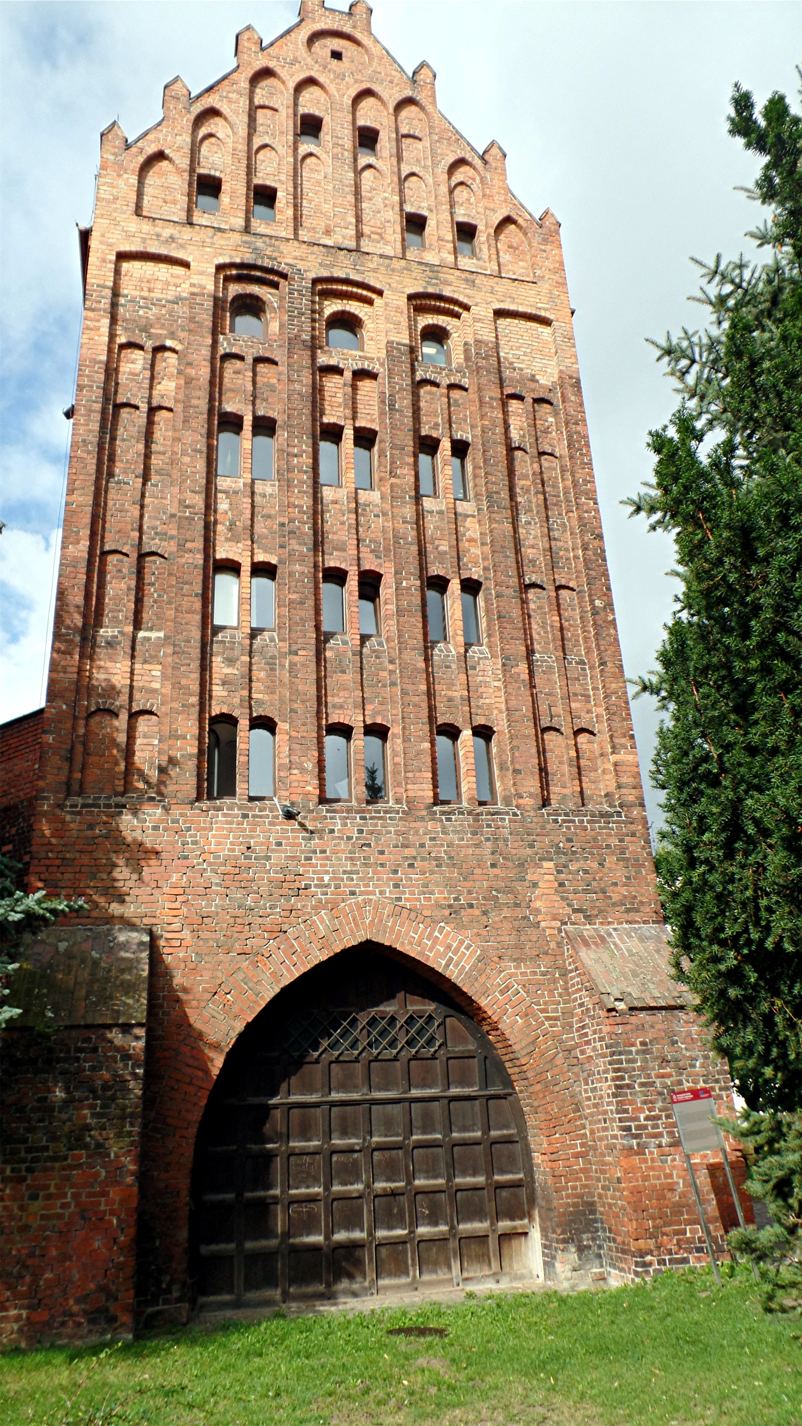 Słupsk, Brama Młyńska, obecnie Muzeum Pomorza Środkowego, 1325-1329, 1365-1370, l. 70. XIX, 1908, 1968